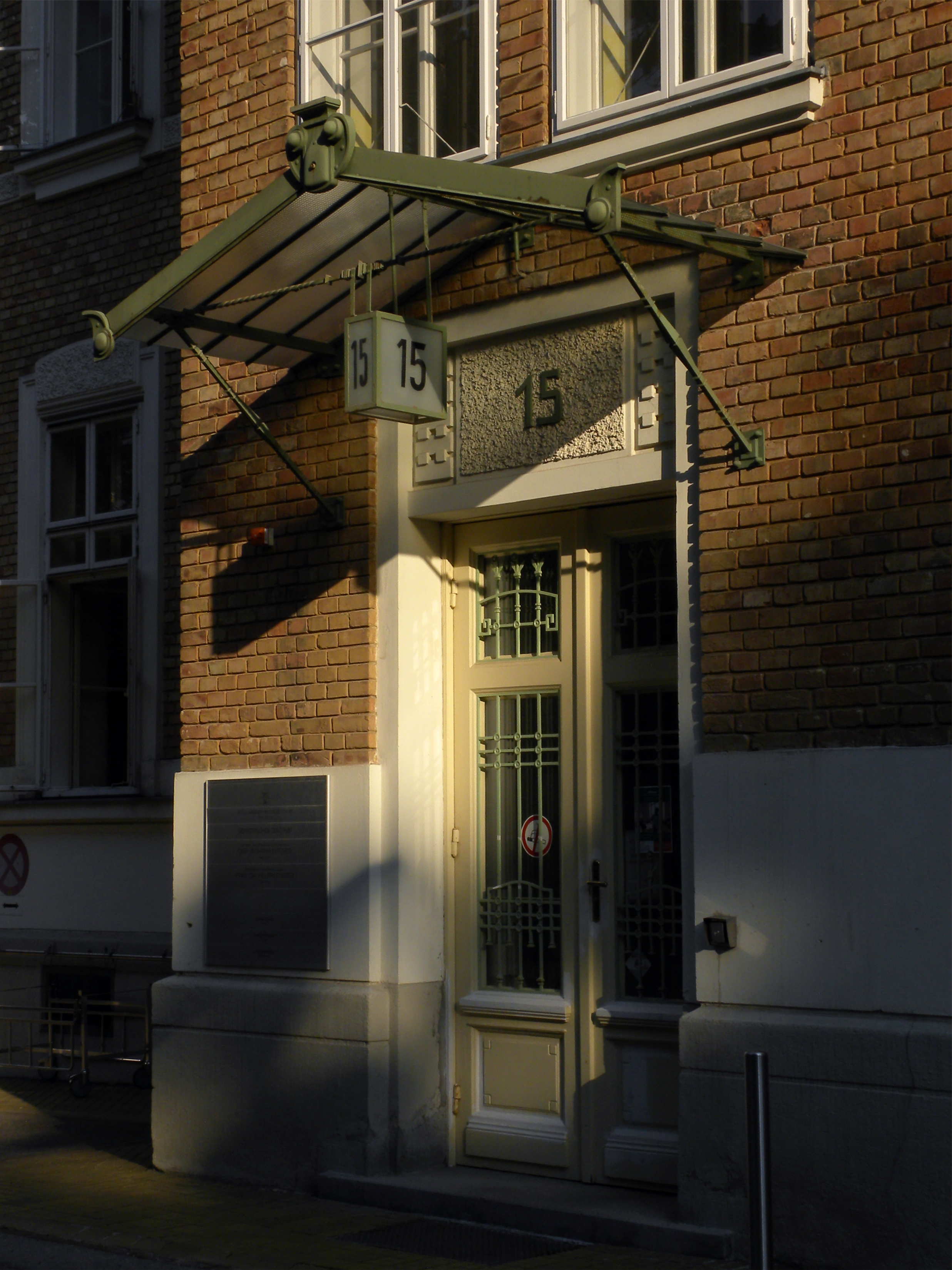 Der Pavillon 15 des psychiatrischen Krankenhauses Baumgartner Höhe ist derzeit dem Otto-Wagner-Pflegezentrum zugeordnet und beherbergt die 2. Geriatrische Abteilung. Die Verwendung der Pavillons, insbesondere im mittleren Bereich, war im Lauf der Geschichte jedoch sehr wechselvoll. In der Zeit des NS-Regimes standen die Pavillons 15 und 17 ab 1940 in Verwendung der "Jugendfürsorgeanstalt Am Spiegelgrund", von 1942-45 als "Städtische Nervenklinik für Kinder Am Spiegelgrund", welche eine der insgesamt mehr als dreißig sog. Kinderfachabteilungen im ehem. Deutschen Reich war. Etwa 700 bis 800 Euthanasiemorde an verhaltensauffälligen und geistig behinderten Kindern fanden während dieser Zeit in der Anstalt unter der Leitung von Heinrich Gross statt, unzählige weitere wurden aber auch in die Tötungsanstalt Hartheim deportiert und dort umgebracht.